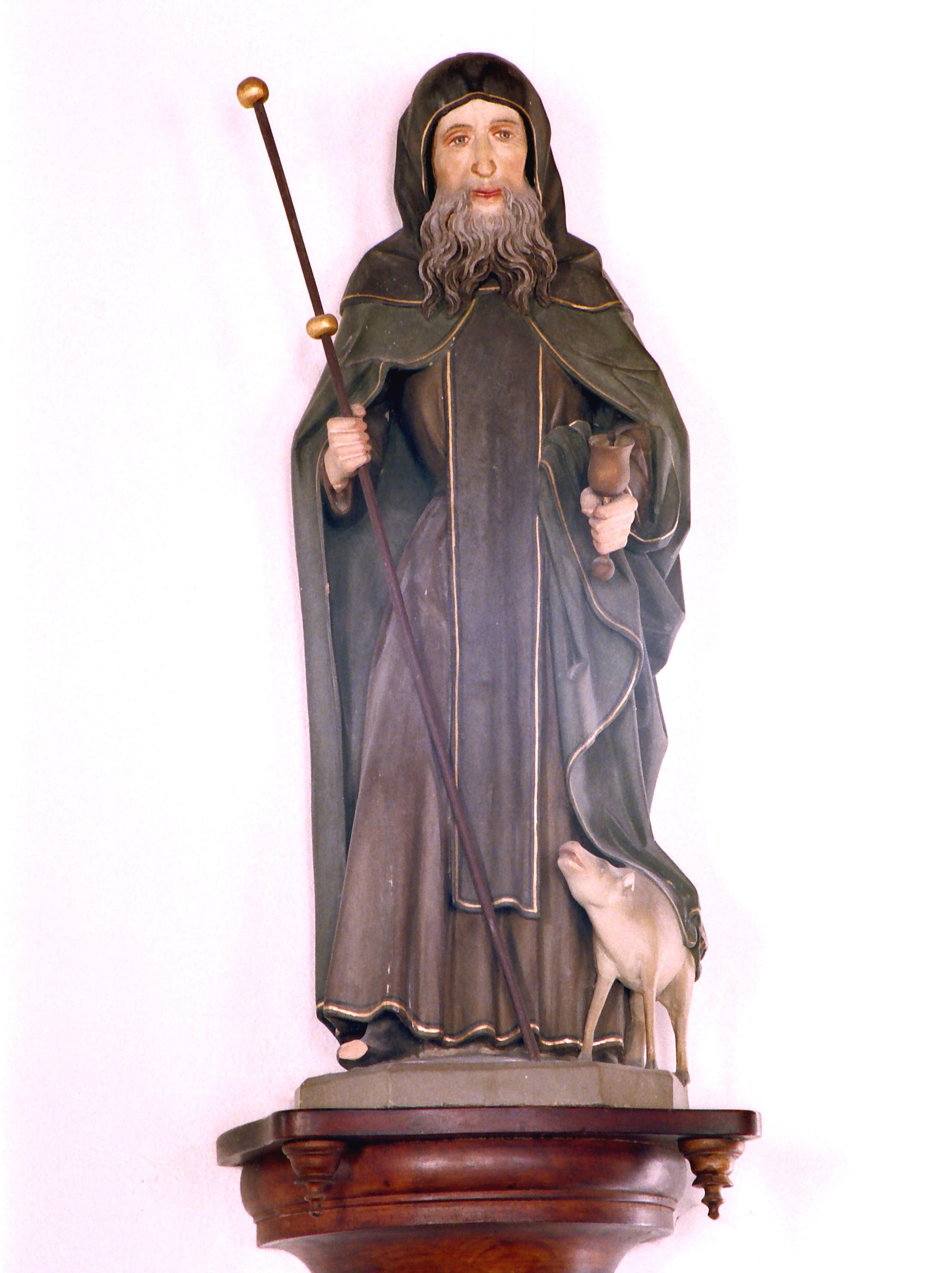 Statue des Hl. Antonius der Eremit in der Kapelle Hl. Kreuz in Pfronten-Kreuzegg